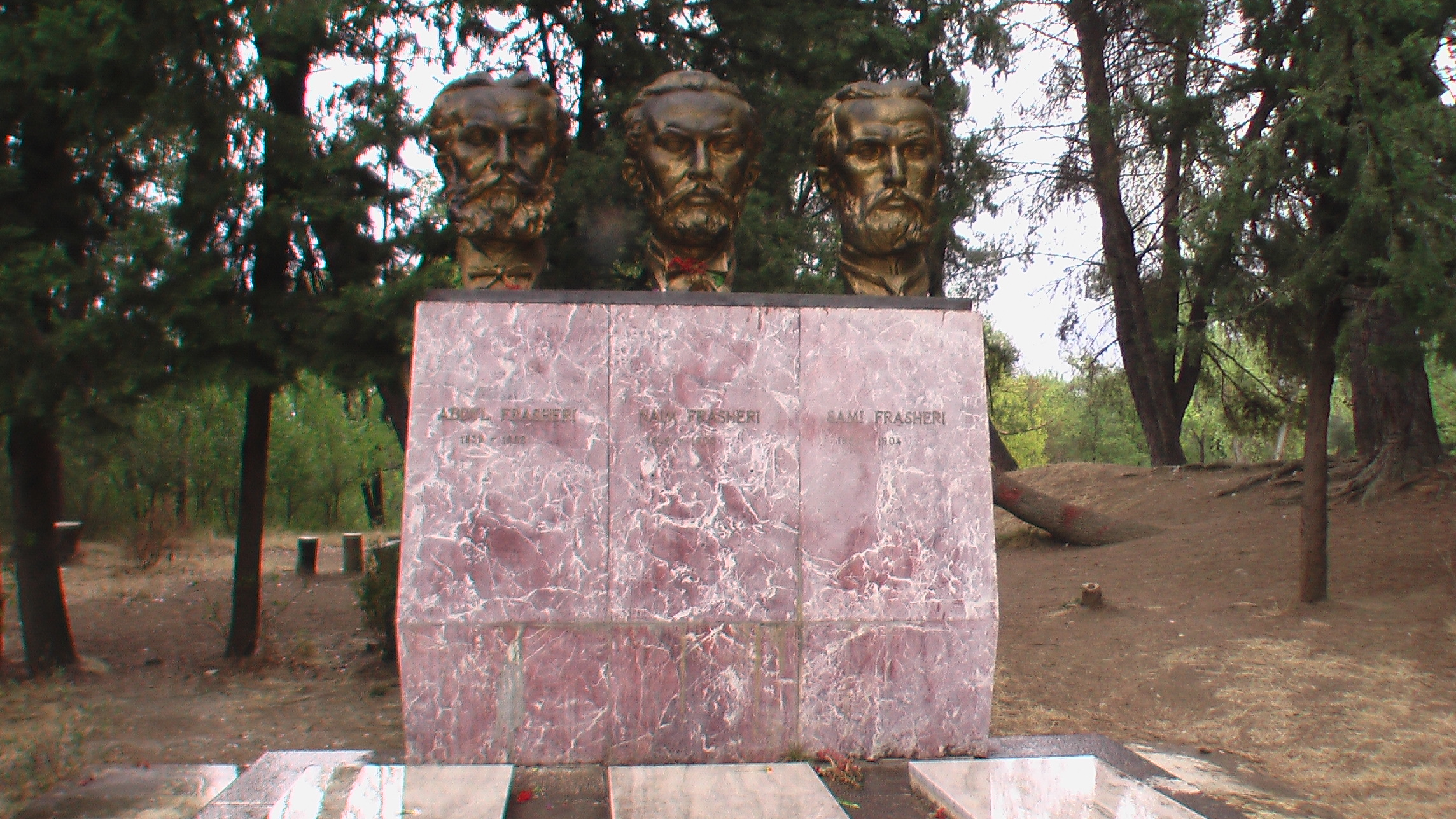 Tirana: Denkmal der Frasheri-Brueder